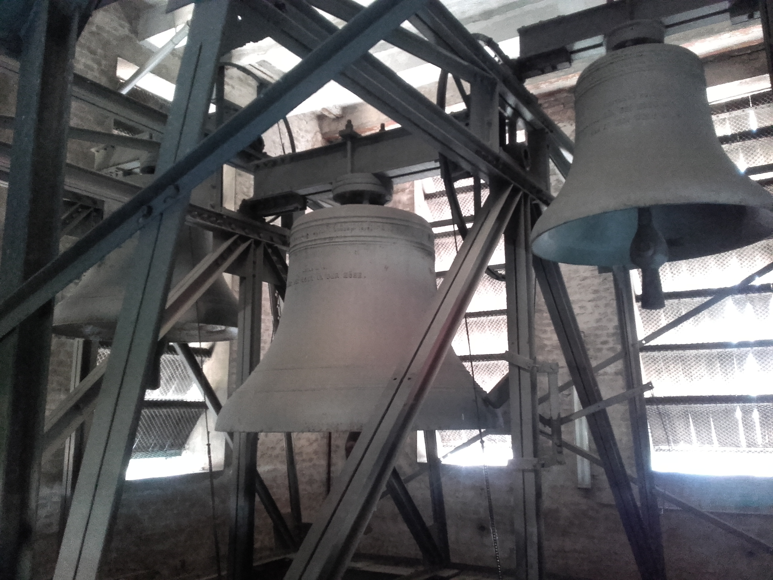 Glocken der Markuskirche an heutiger Stahlstreben-Aufhängung